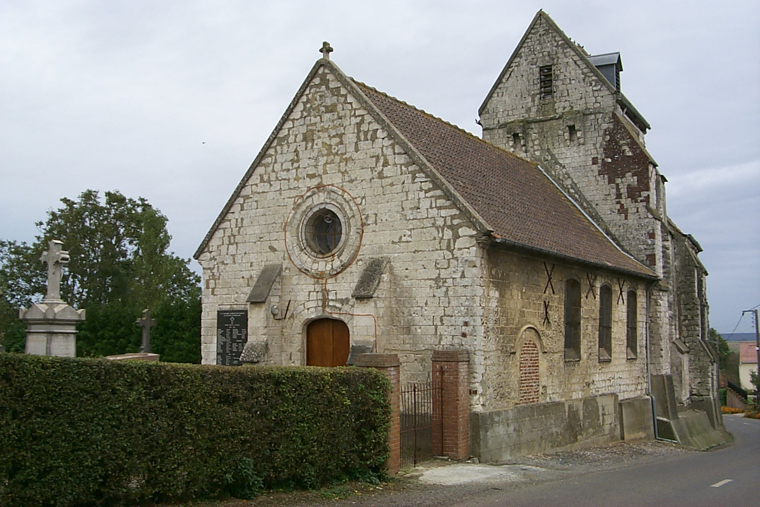 Église de Mentque; Commune de Mentque-Nortbécourt FR-62